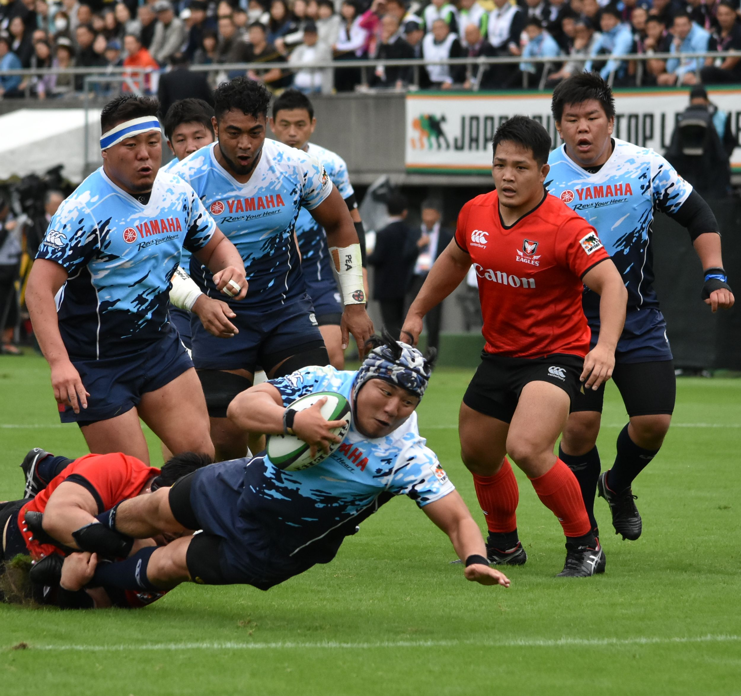 日野 剛志